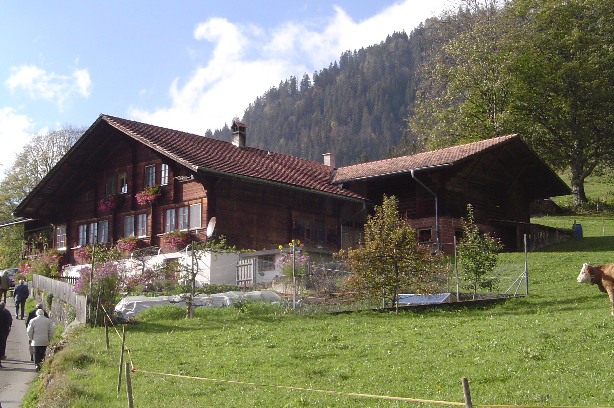 heute Tal Erlenbach